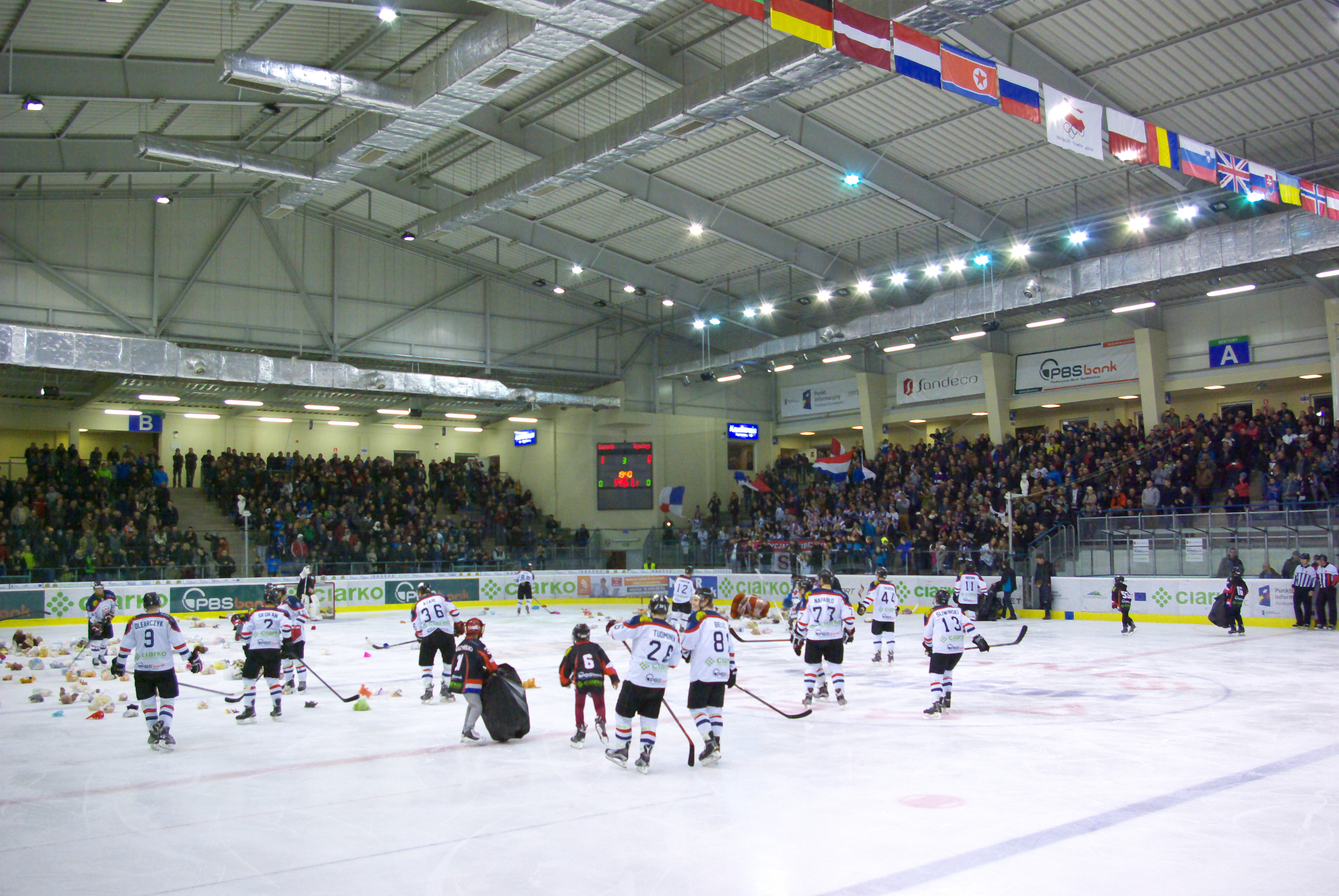 Mecz STS Sanok - GKS Tychy (Arena Sanok, 22 grudnia 2015)